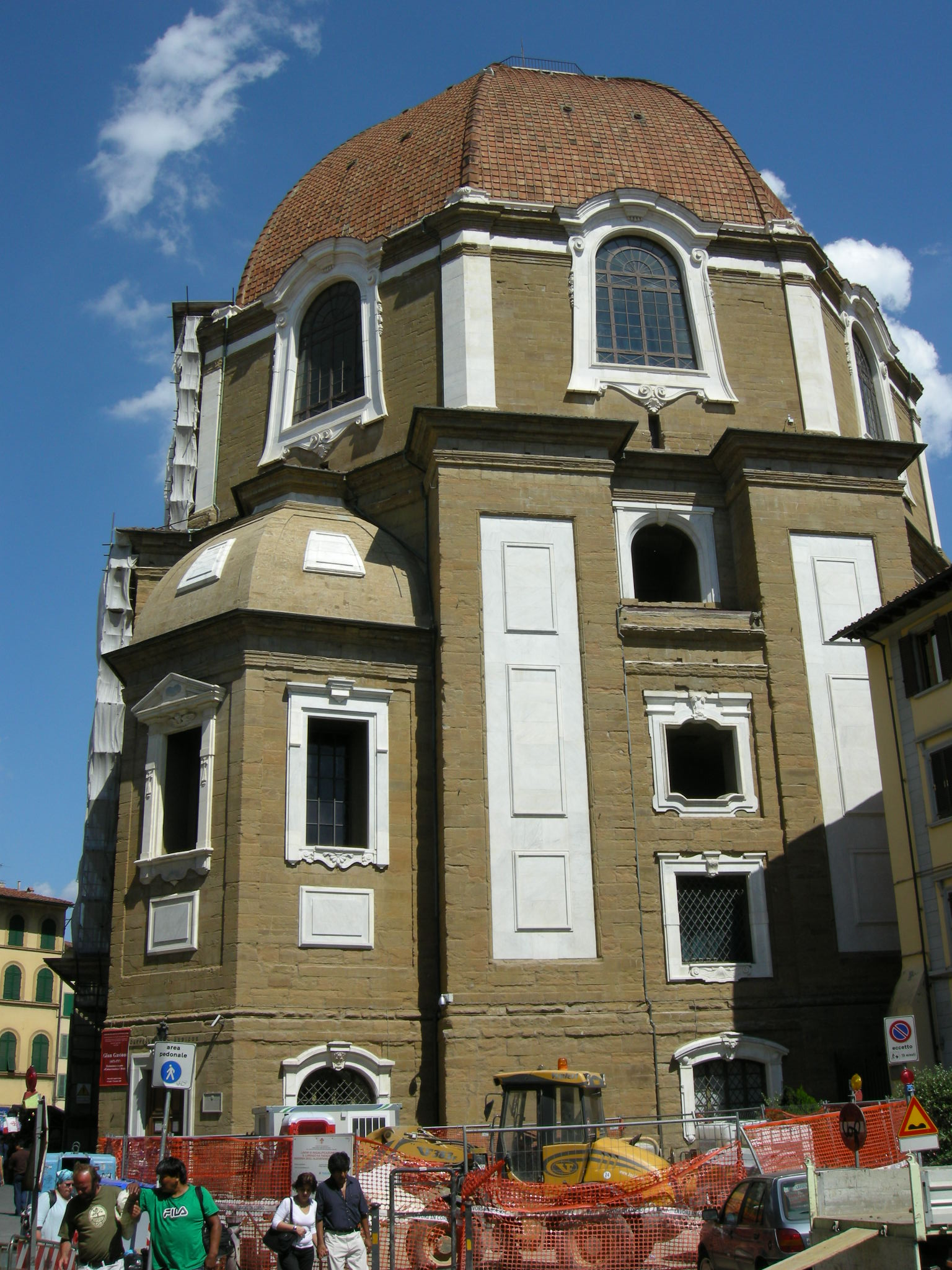 Cappelle medicee 11